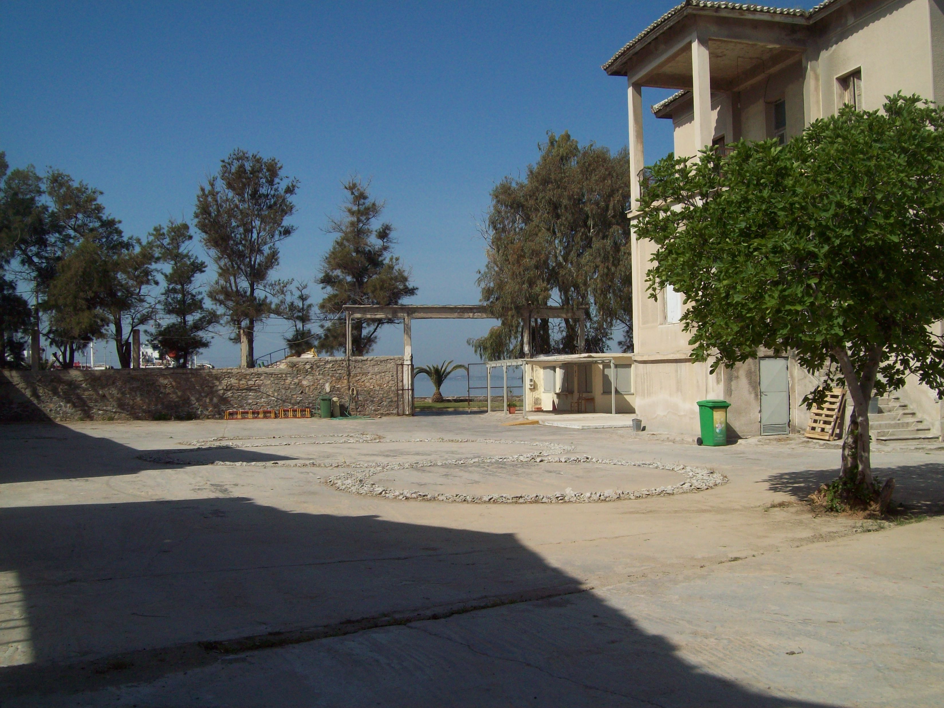 ΠΑΛΑΙΟ ΕΛΑΙΟΥΡΓΕΙΟ ΕΛΕΥΣΙΝΑΣ, ΧΩΡΟΣ ΠΡΑΓΜΑΤΟΠΟΙΗΣΗΣ ΦΕΣΤΙΒΑΛ ΑΙΣΧΥΛΕΙΩΝ, Η ΕΙΣΟΔΟΣ